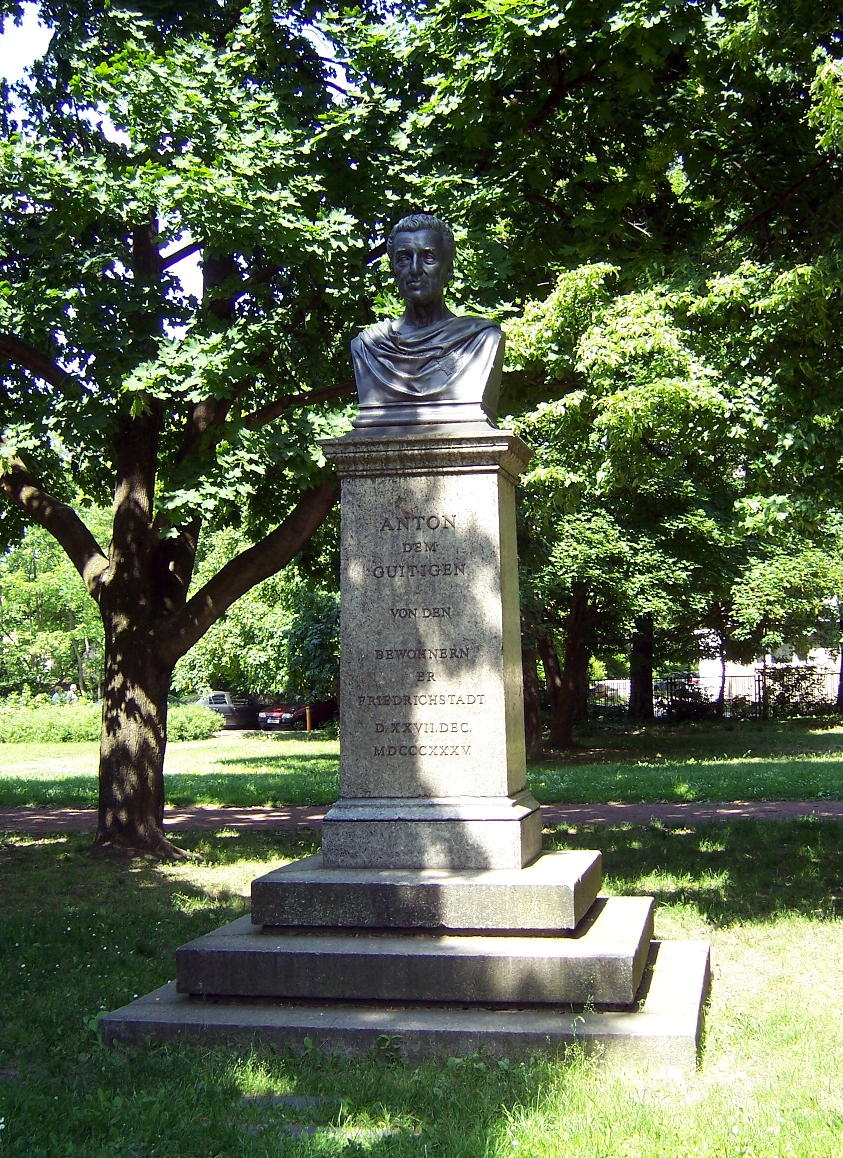 Statue des sächsischen Königs Anton der Gütige von Ernst Rietschel, gestiftet 1835. Standort: Hohenthalplatz, Friedrichstadt, Dresden.